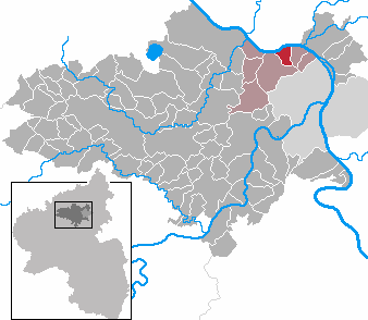 Urmitz in Rhineland-Palatinate - district Mayen-Koblenz